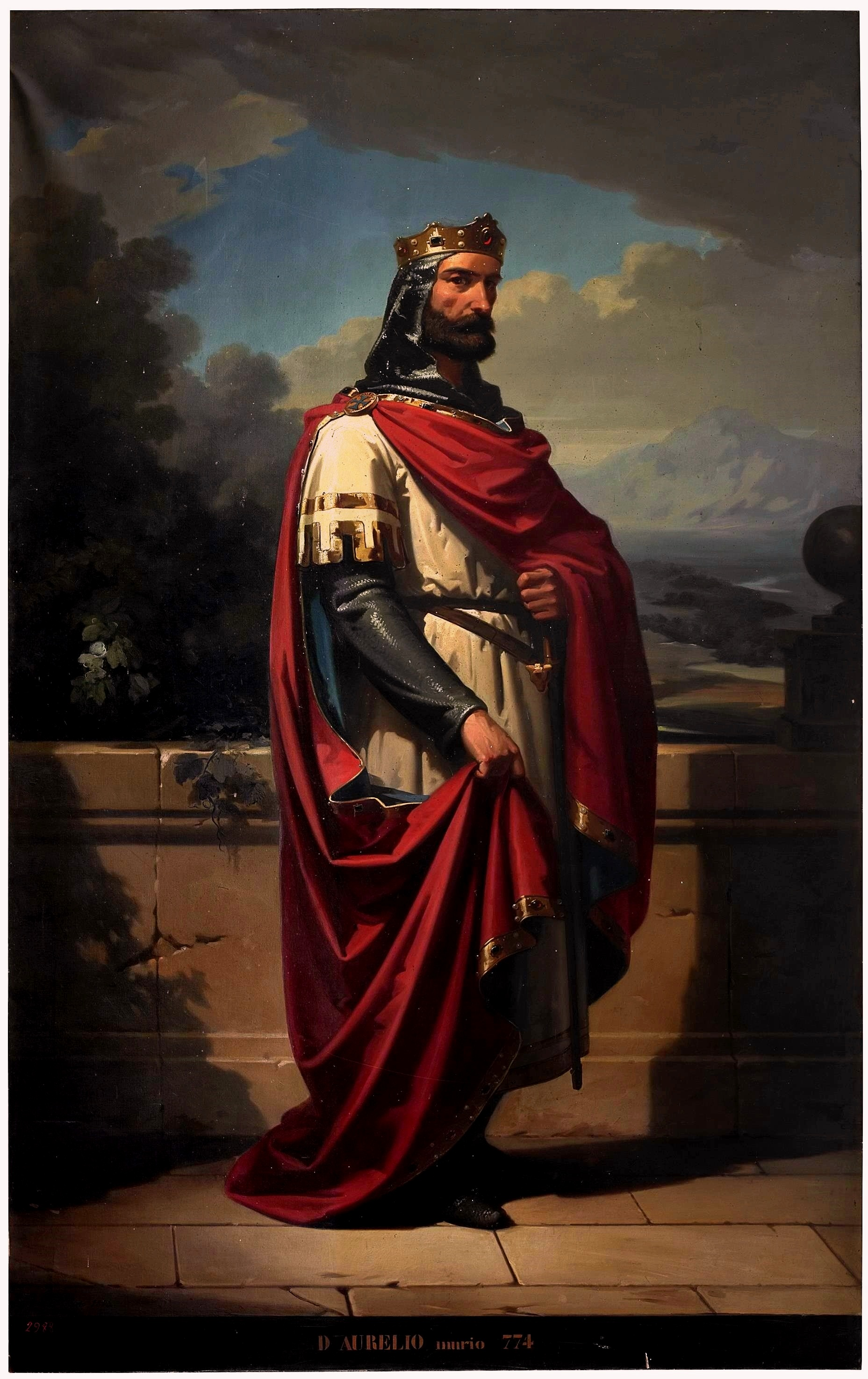 Retrato imaginario del rey Aurelio de Asturias († 774), que fue hijo de Fruela de Cantabria, sobrino del rey Alfonso I de Asturias, hermano del rey Bermudo I el Diácono, y sucesor de su primo, el rey Fruela I.